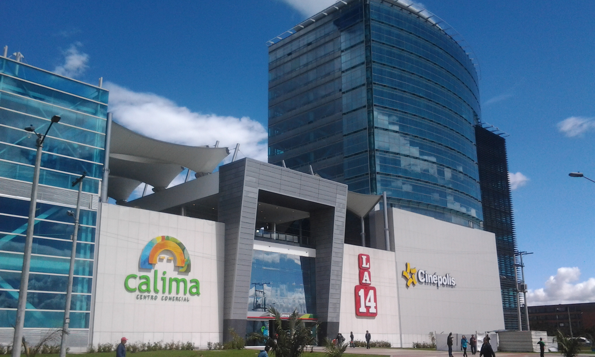 Centro Comercial Calima, en Bogotá D.C.